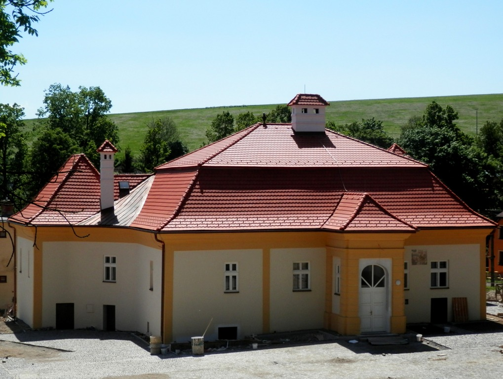 Národná kultúrna pamiatka na Slovensku, Šarišské Dravce - opravený kaštieľ.